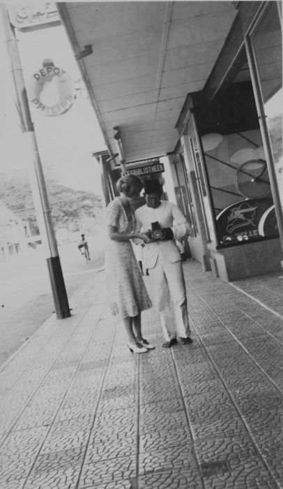 foto. Een Europese vrouw in de Rijswijkstraat in gesprek met een Javaan over een fotocamera